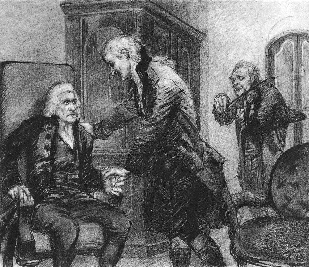 Моцарт и Сальери слушают игру слепого скрипача. Иллюстрация к "маленькой трагедии" "Моцарт и Сальери"